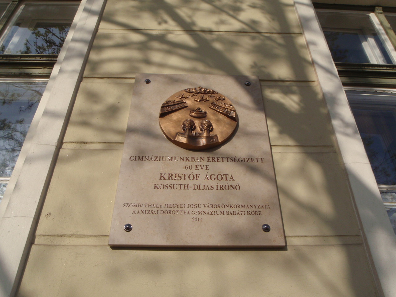 Kristóf Ágota Emléktábla Szombathely Aréna utca, Kanizsai Dorottya Gimnázium falán